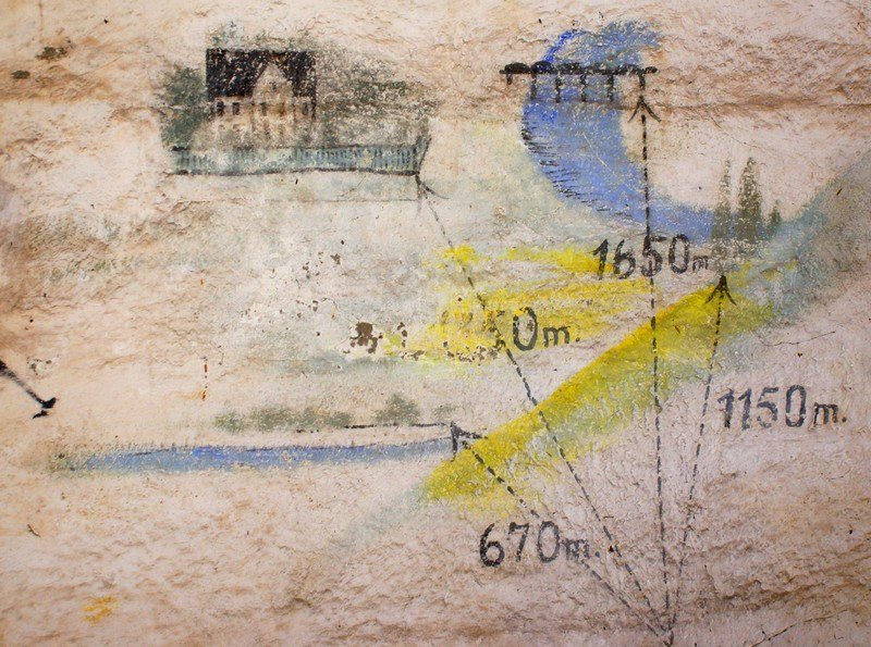 Représentation dessinée des angles de tir peinte sur le mur de la casemate de flanquement du fort d'Illange